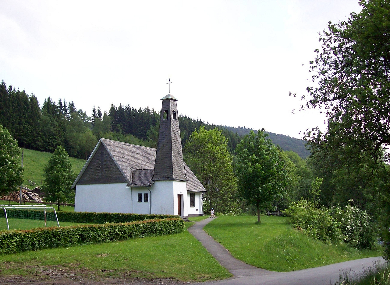 Schmallenberg-Lengenbeck, Kapelle (Germany)